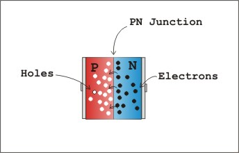 Struktura bazike e silicit(Si),në çastin e lidhjes PN dhe paraqitja e bartësve kryesorë dhe minorë. Elektronet e lira në regjionin n,afër lidhjes pn fillojnë të shpërndahen përgjatë lidhjes dhe vendosen në vrimat afër lidhjes në regjionin p.